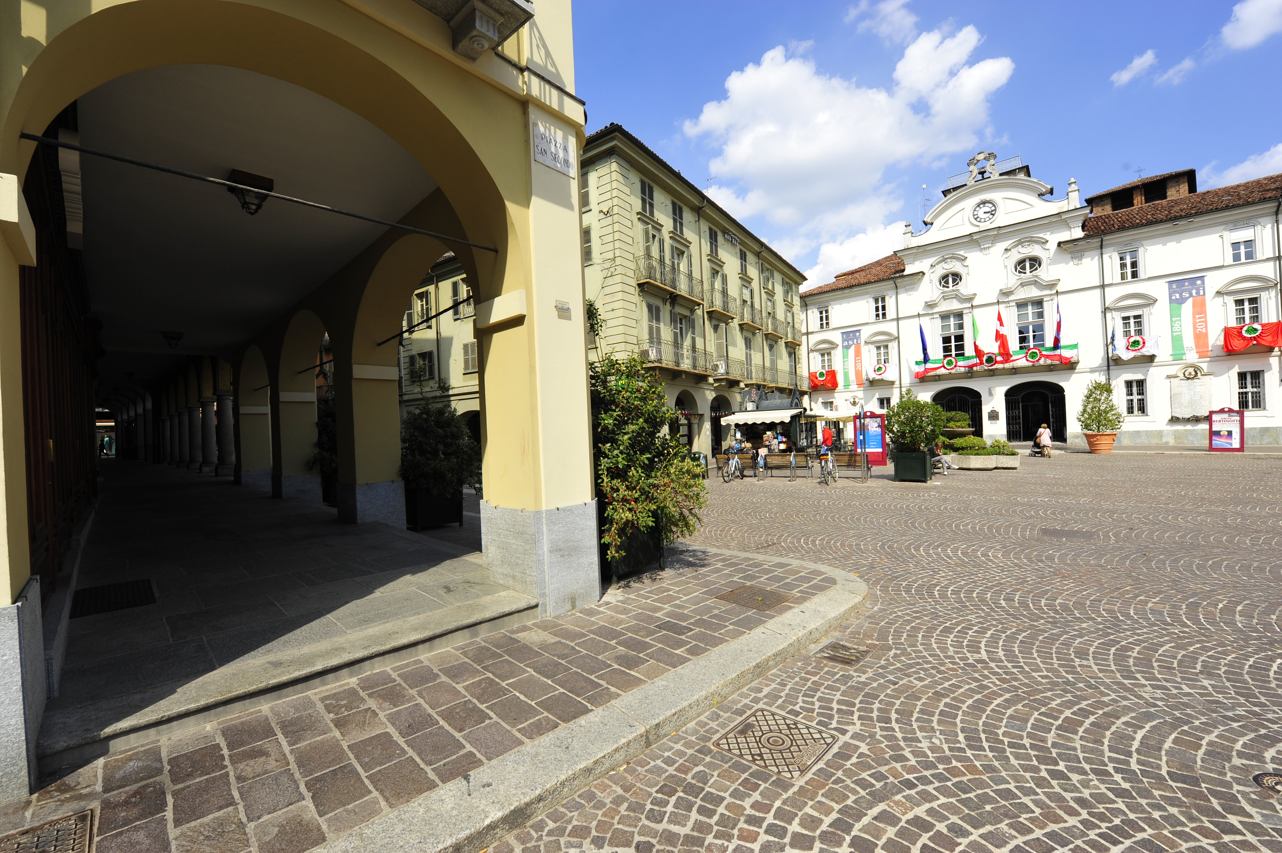 Palazzo Civico This is a photo of a monument which is part of cultural heritage of Italy.